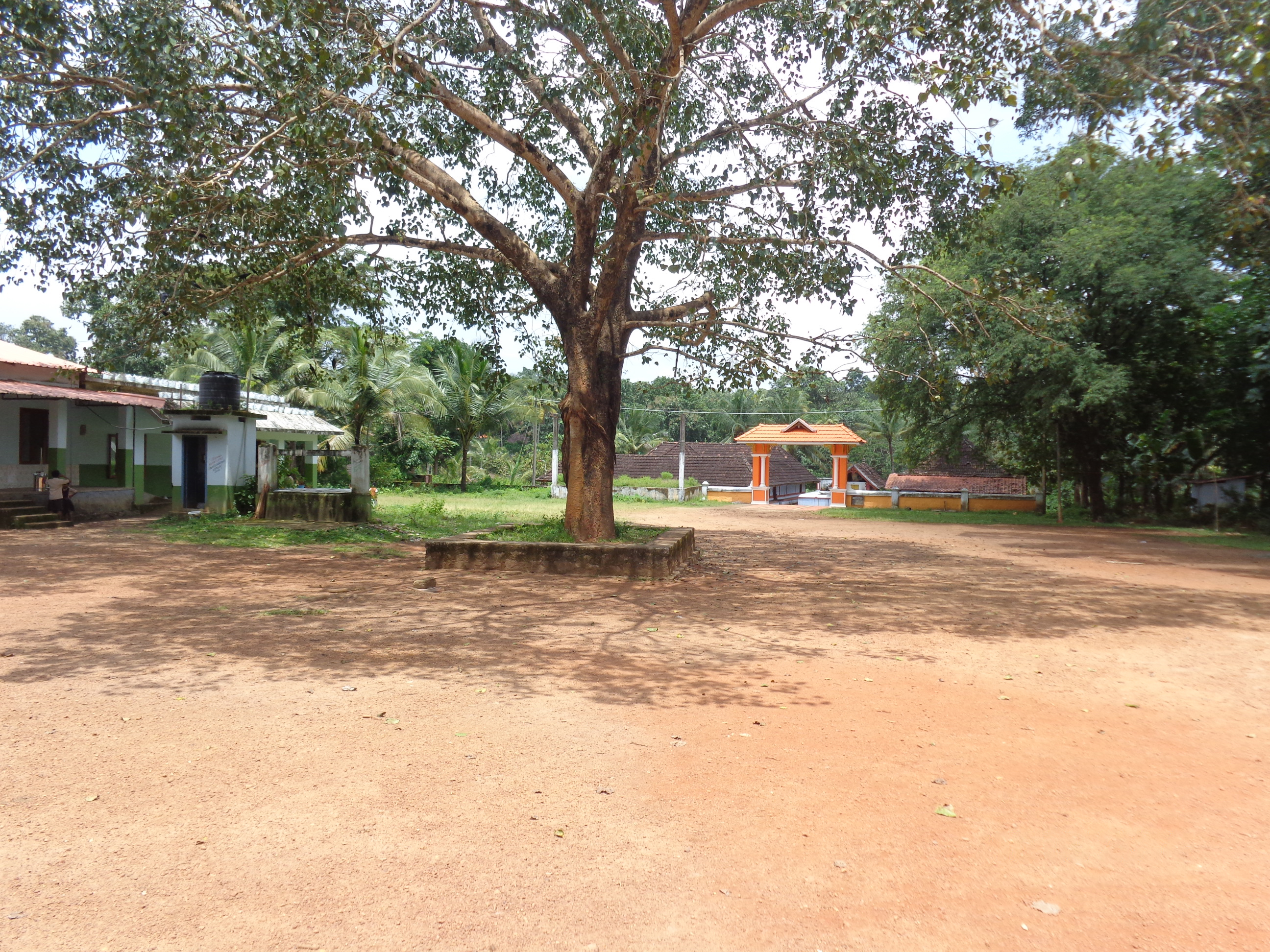 view of moozhikulangara devi temple , neendoor, kottayam